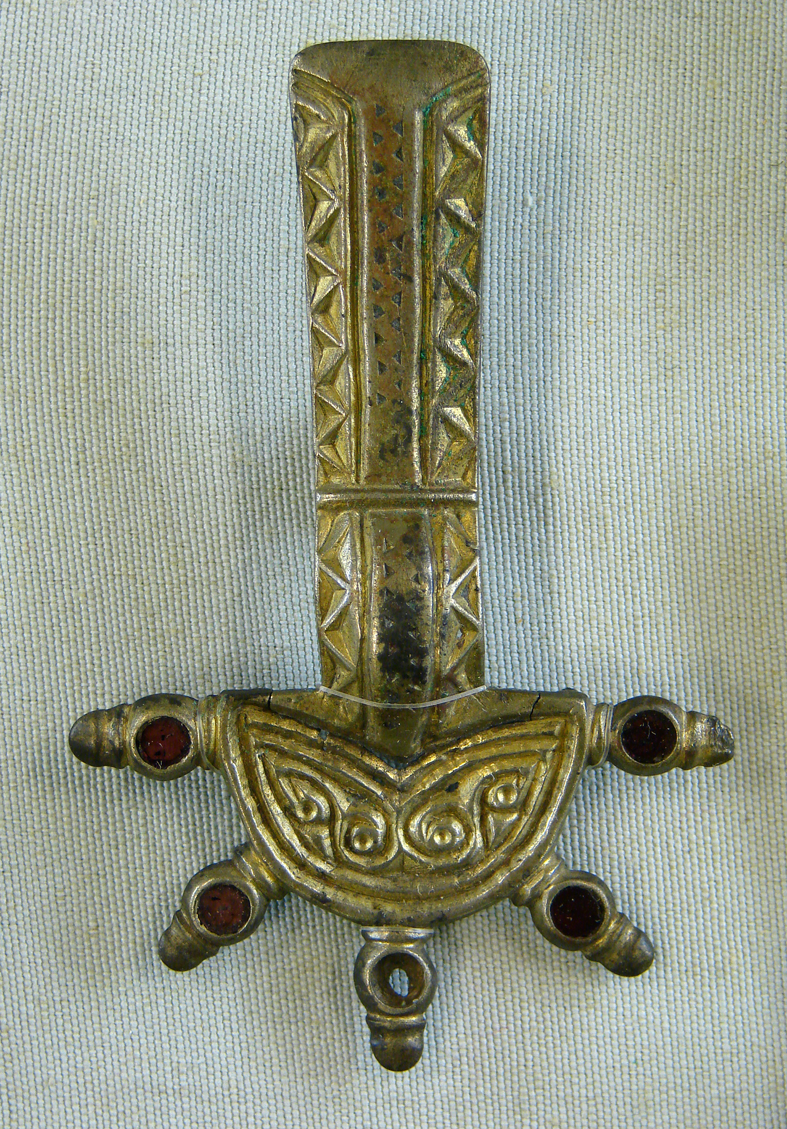 Fibule ansée digitée, bronze, verre ou grenats; 450 à 600 + JC. Musée de Laon.